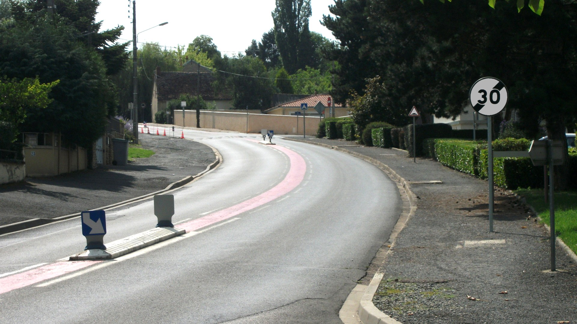 À partir du panneau la vitesse n'est plus limitée à 30 kilomètres par heure. (Et pourtant, il y a un ralentisseur plus loin…)Pour des raisons de lisibilité, augmentation du contraste sur toute l'image, puis uniquement sur le panneau.Panneaux : B33 Fin de limitation de vitesse : Signaux Girod, 2011 (circonstance : arrêté municipal de la mairie de Bellerive-sur-Allier daté de 2011)